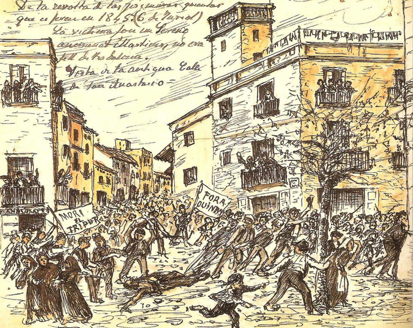 Dibuix del Motí de les quintes del 7 de juliol de 1845. Amb els amotinats baixant pel carrer de Sant Anastasi, i un amotinat matant el sereno Martínez. A la dreta del tot s'observa una de les columnes de l'Ajuntament.